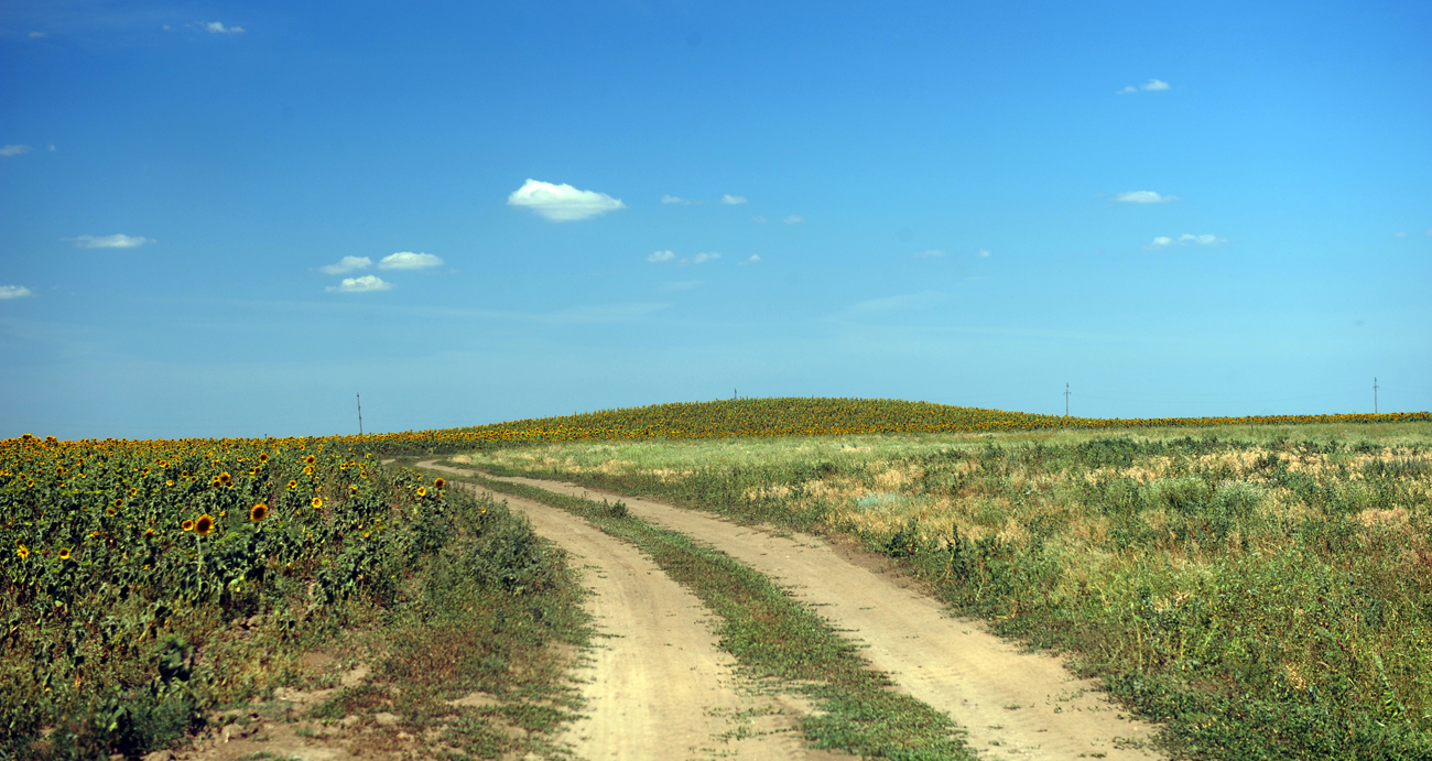 безымянный курган